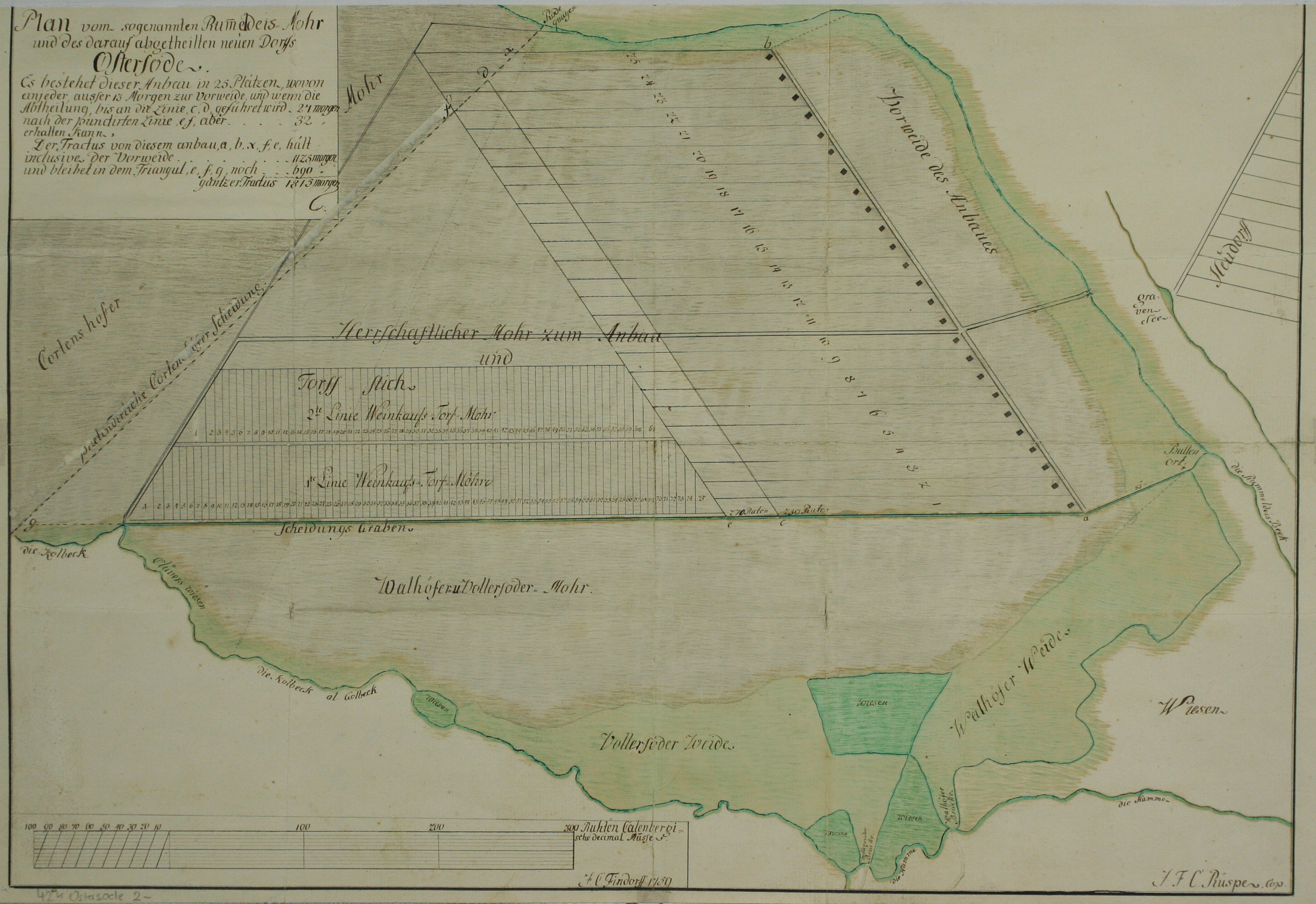 Plan vom sog. Rummeldeis Moor und des darauf aufgeteilte neue Dorf Ostersode in 25 Plätze. Handzeichnung von J. C. Findorff, Papier, M ca. 1:9450, 50x3, 1759